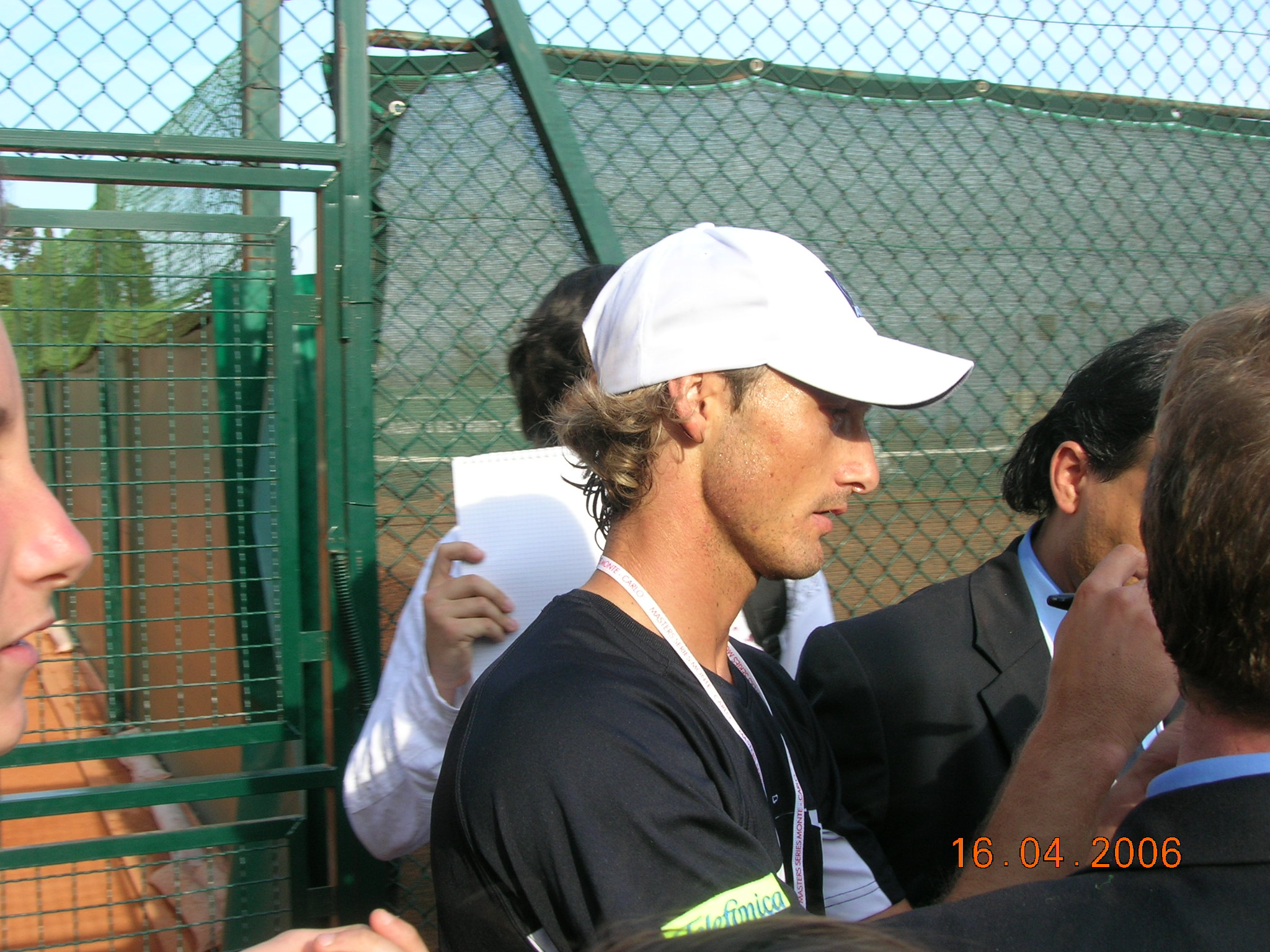 Foto scattata da me a Montecarlo. Ferrero mentre firma autografi al Masters Series di Montecarlo, 2006. Licenza libera.